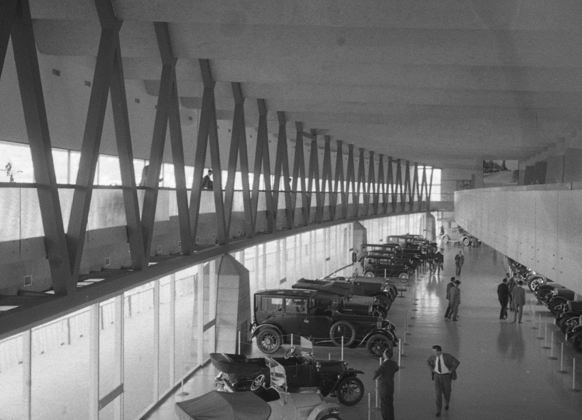 Servizio fotografico : Torino, 1961 / Paolo Monti. - Strisce: 1, Fotogrammi complessivi: 9 : Negativo b/n, gelatina bromuro d'argento/ pellicola ; 24x18mm (35 mm). - ((Sul portanegativi: Penn Agfa 25. - Serie Verde. - Occasione: Documentazione del Museo dell'automobile. - Fonte: Agenda di Paolo Monti: Foto Leica 1 / 1-51 verde, 1-110 nera (1958-1963), presso Archivio Paolo Monti